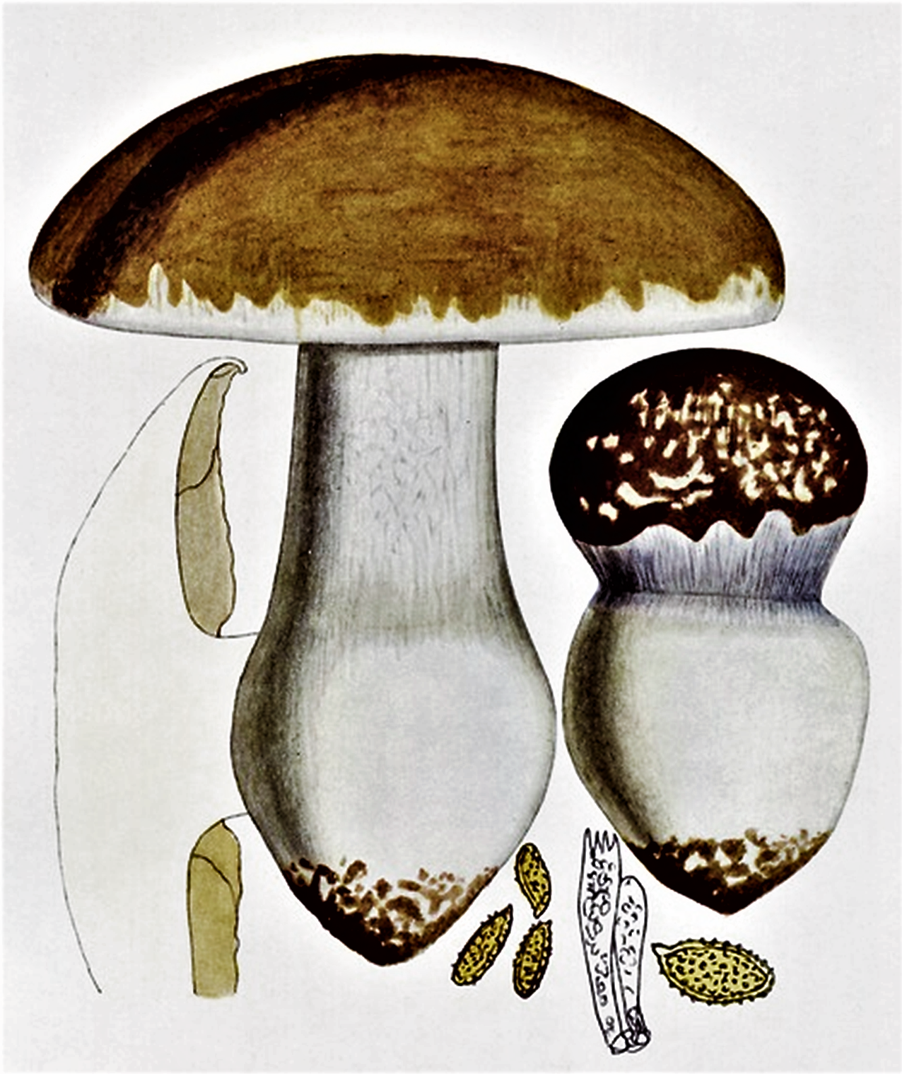 Giacomo Bresadola: Cortinarius praestans